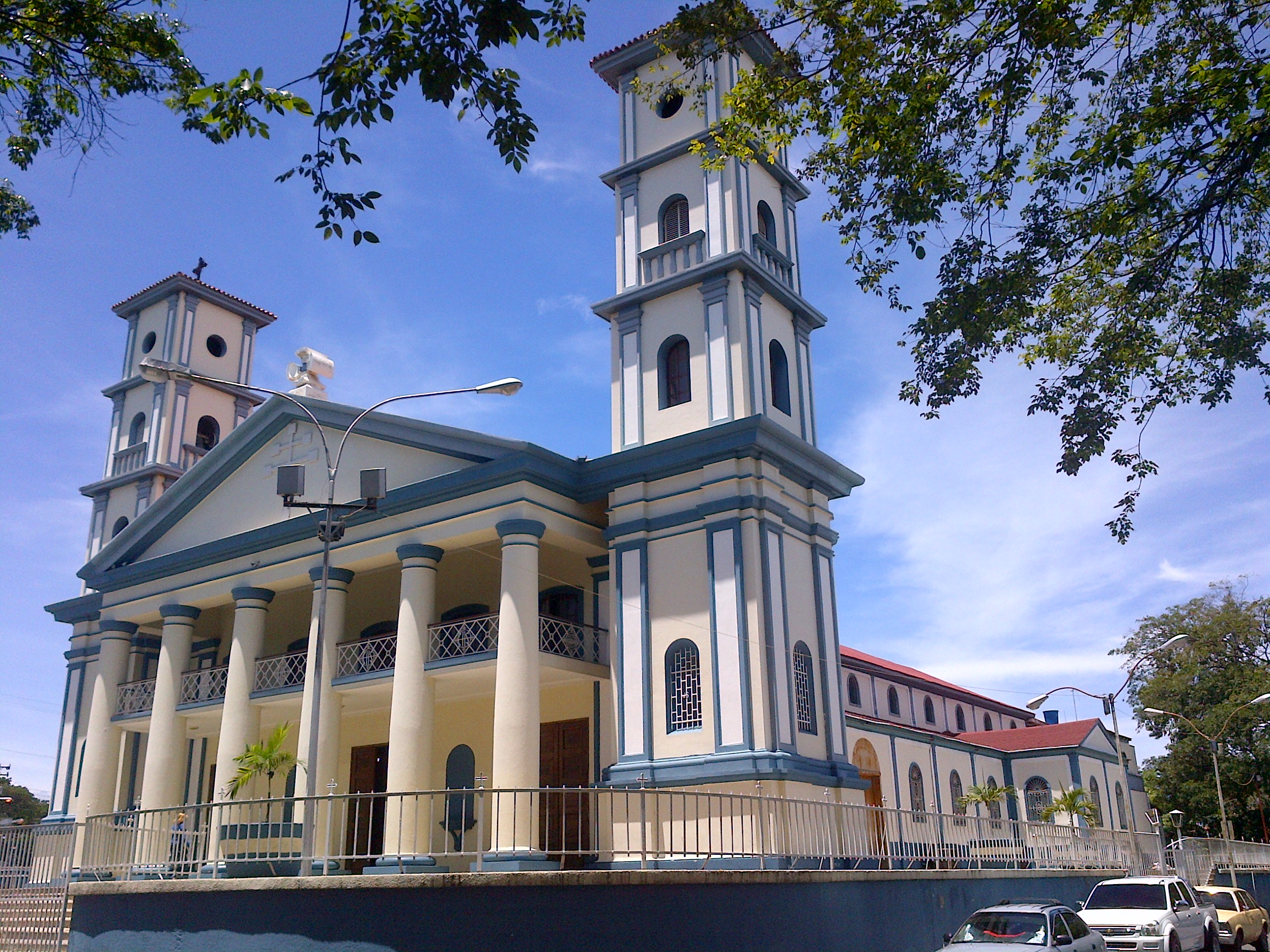 Vista lateral izquierda de la iglesia Catedral de Cumaná.